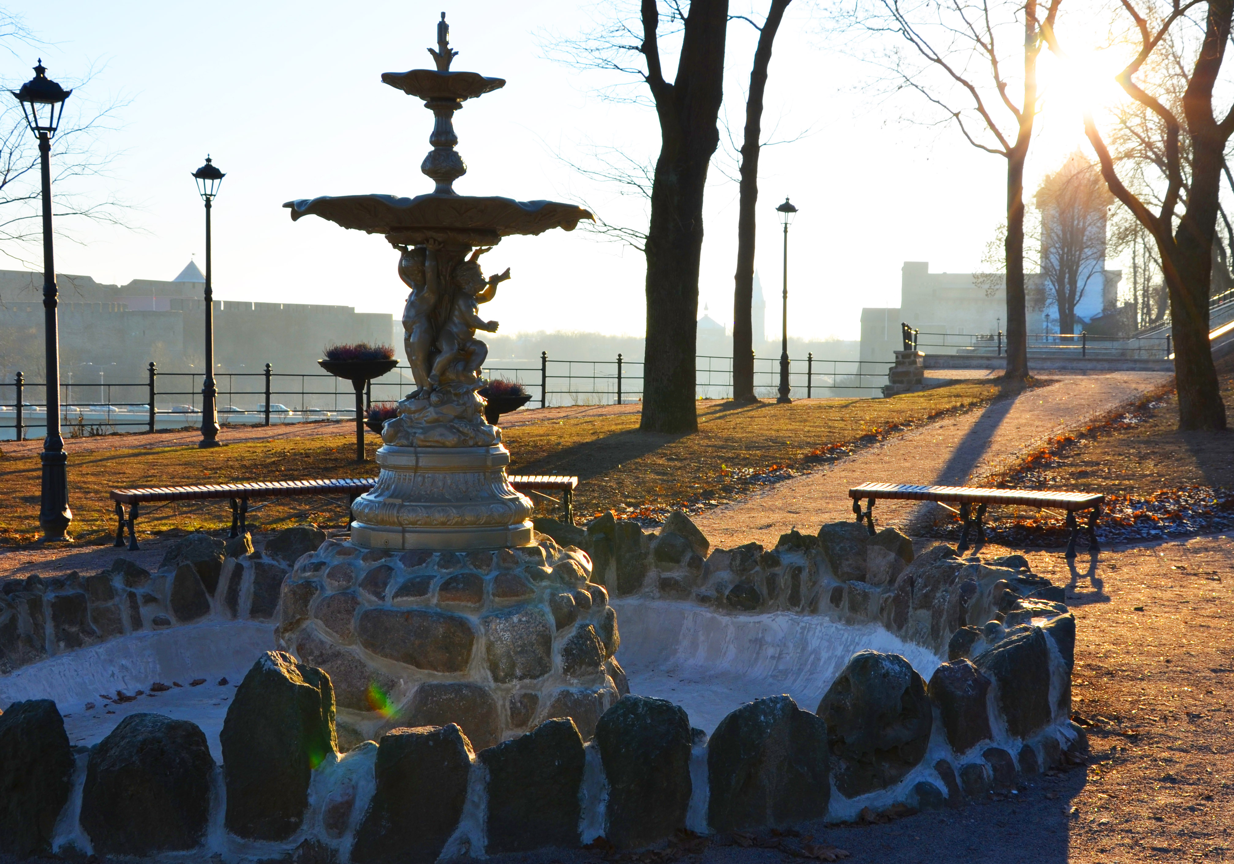 Puskkaev Pimeaias